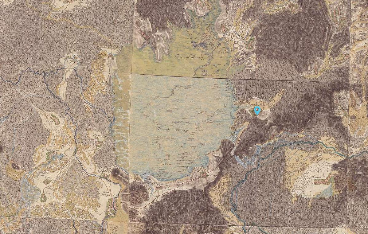 Szernye-mocsár térképe az 1763-as első katonai felmérés térképről